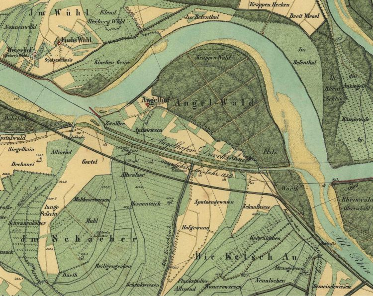 Rheinkorrektion, Angelhofer Durchschnitt bei Ketsch (1826)